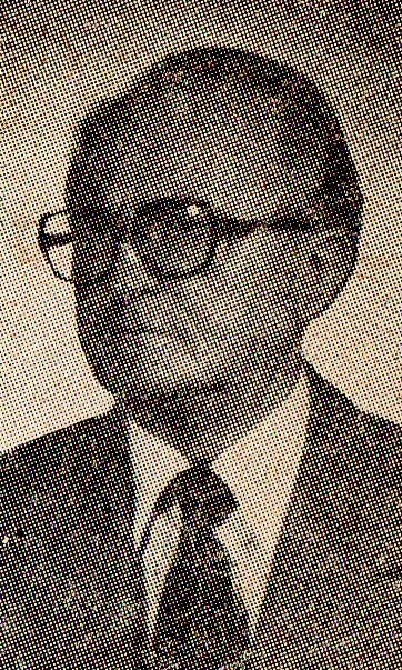 Witalis Ludwiczak - polski prawnik.